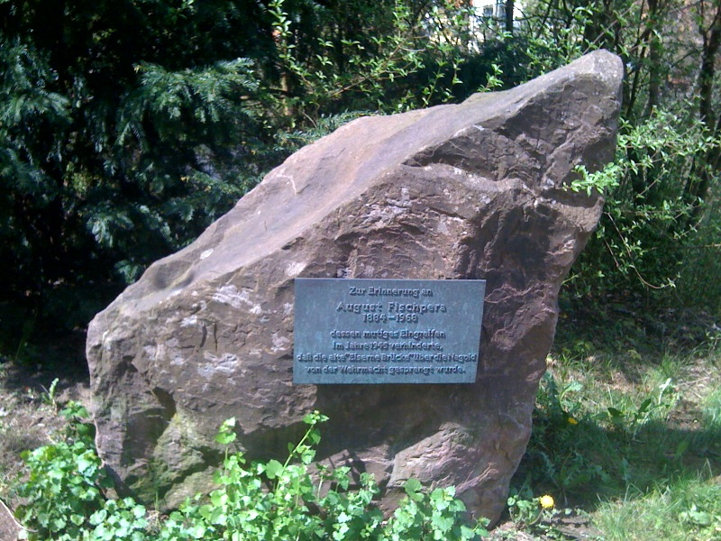 Gedenkstein zu Ehren August Fischpera